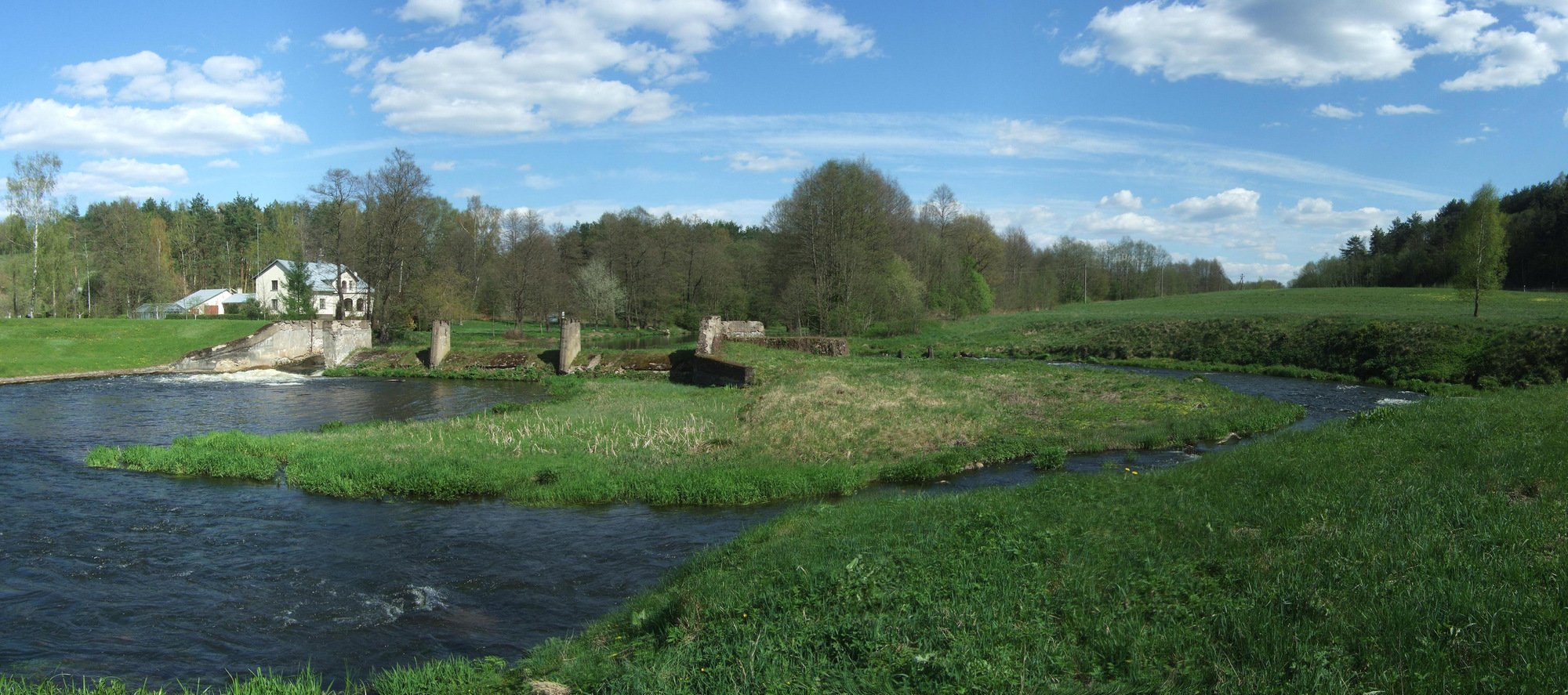 Akveduko užtvankos ant Vokės upės liekanos.